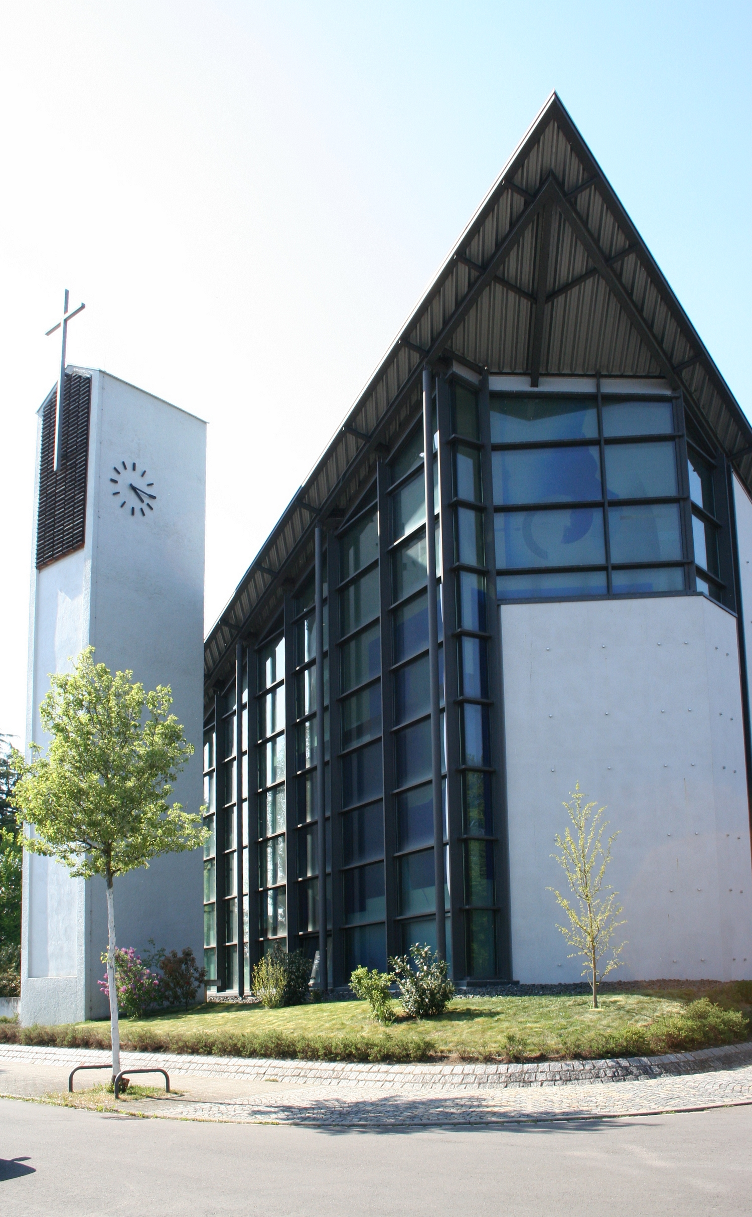 Heilig-Kreuz-Kirche in Stuttgart-Sommerain